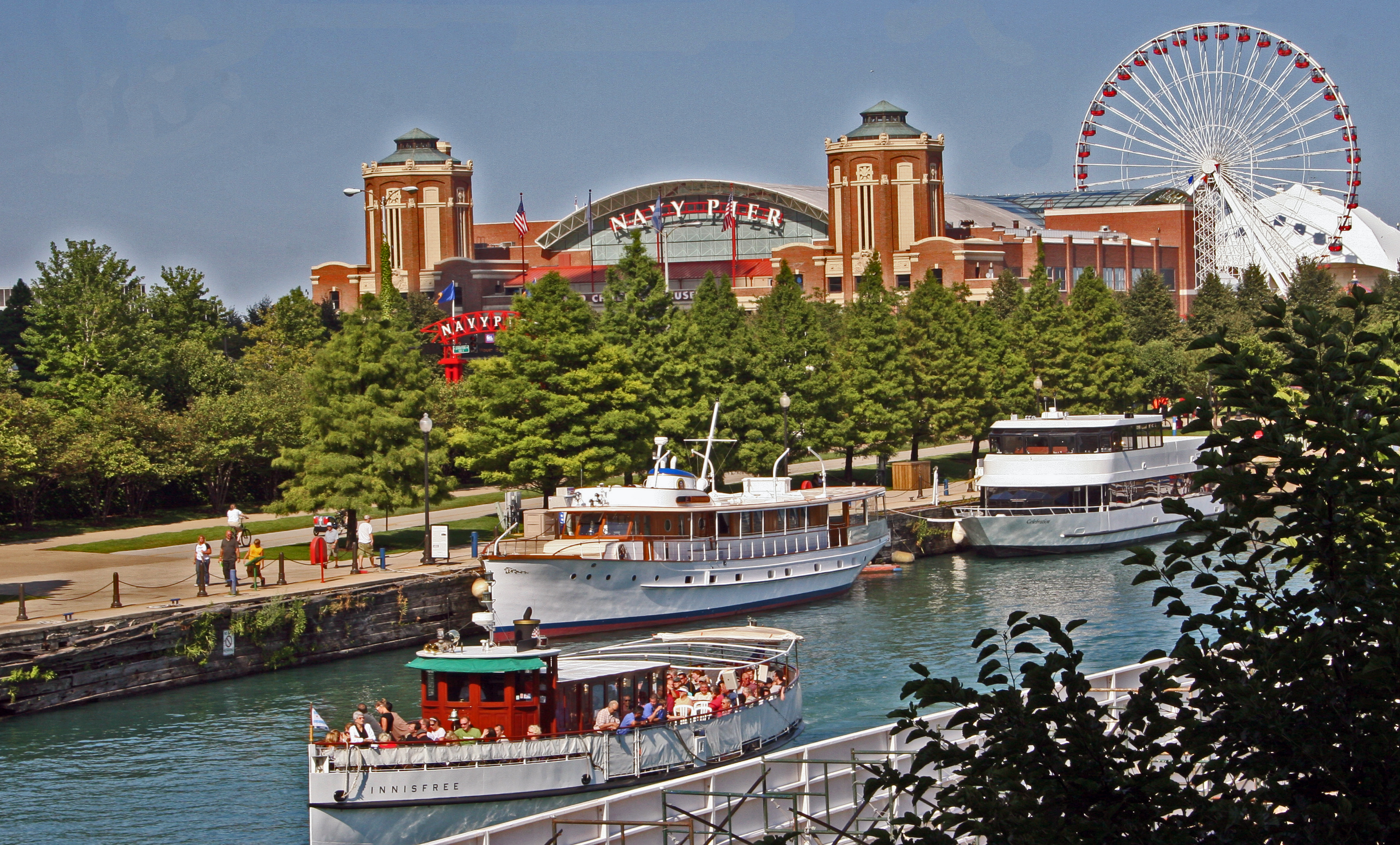 Navy Pier